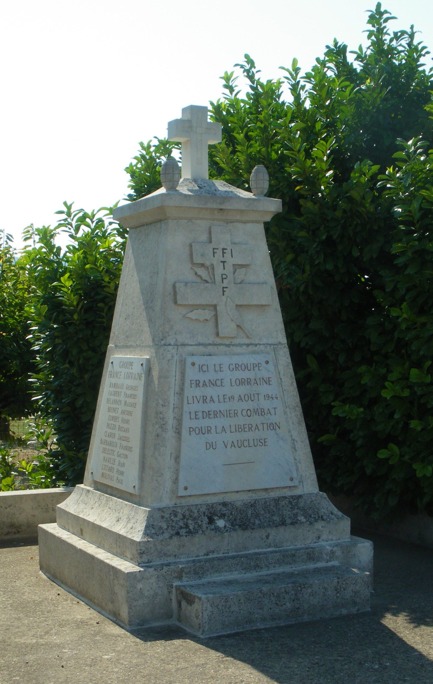 Stèle à la sortie de Coustellet (Vaucluse, France), direction d'Apt : " Ici le groupe France Lorraine livra le 19 aout 1944 le derier combat pour la libération du Vaucluse - A la mémoire des morts de la région vauclusienne "